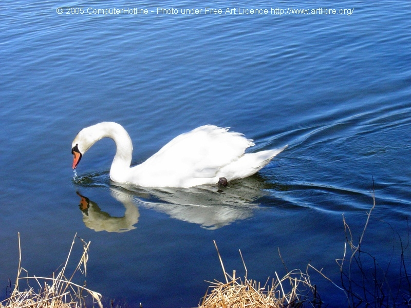 Cygne